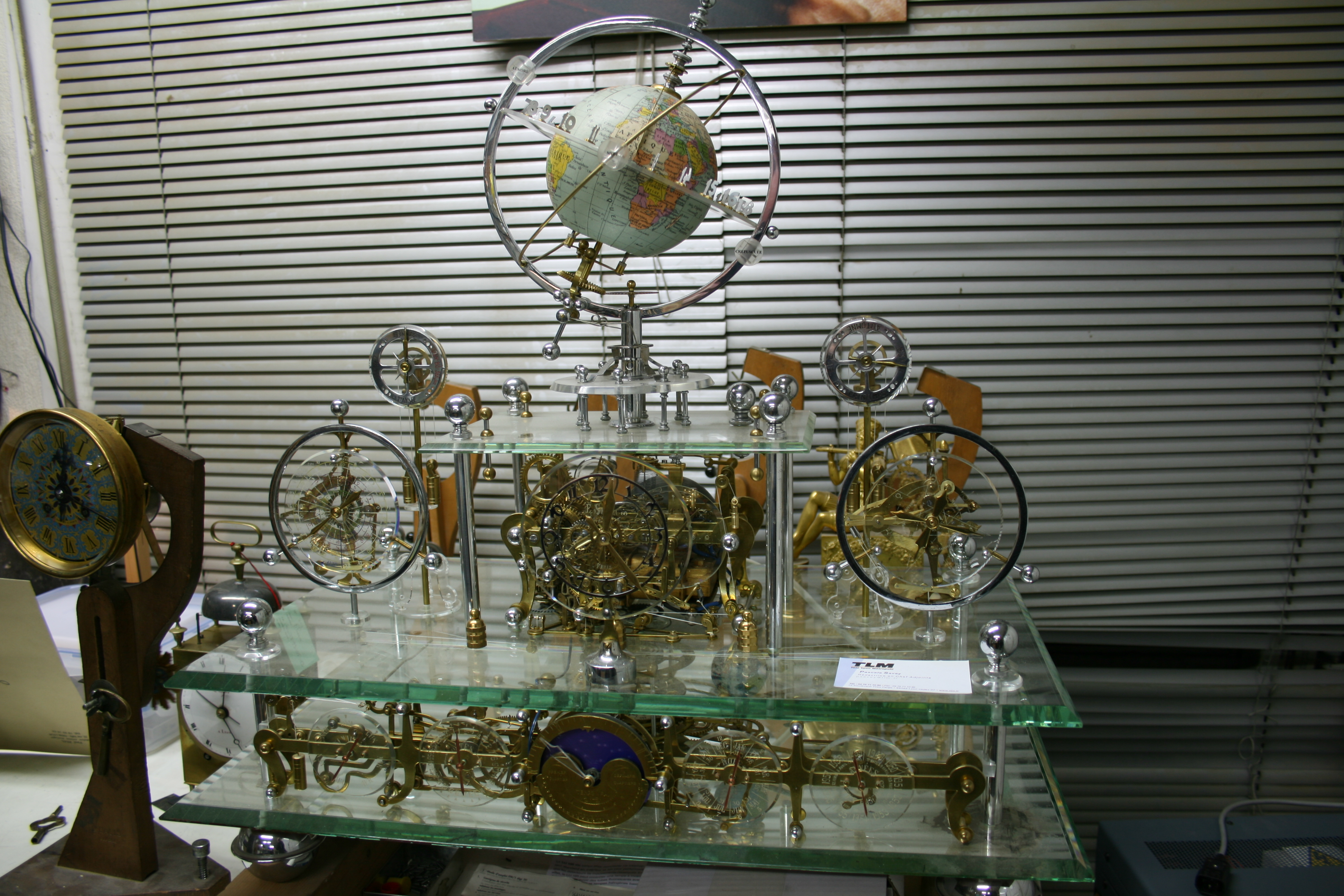 Photographie de l'Horloge astronomique de Sénac mise à ma disposition par le musée du Temps (Besançon)